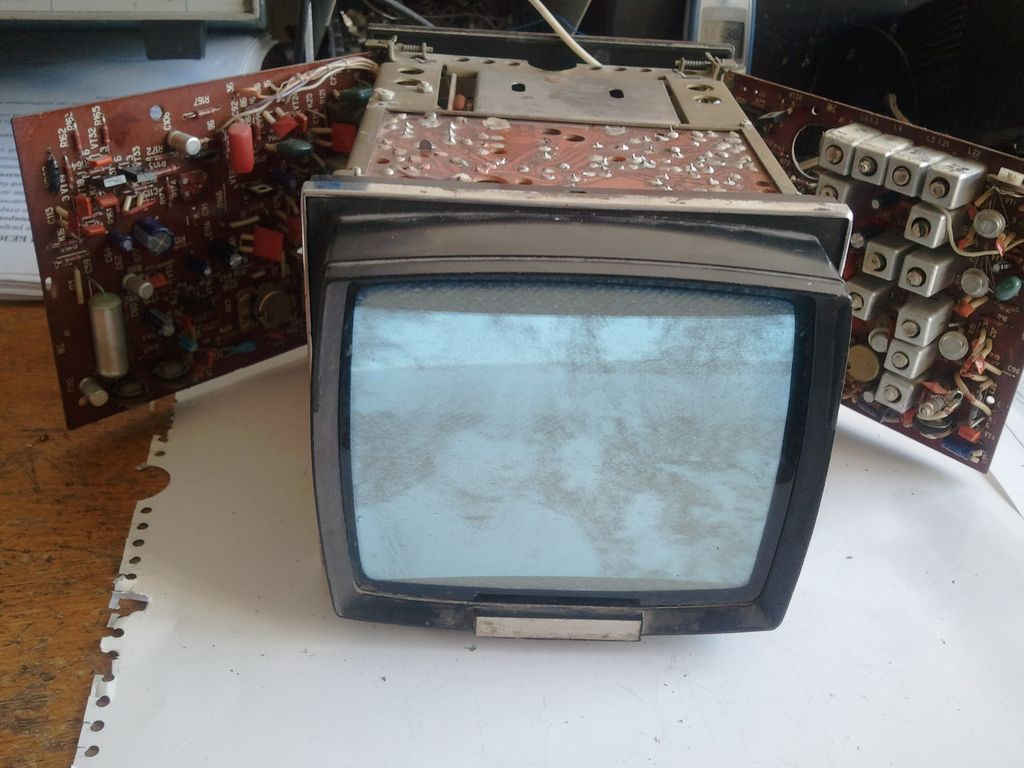 Телевизор Электроника ВЛ100